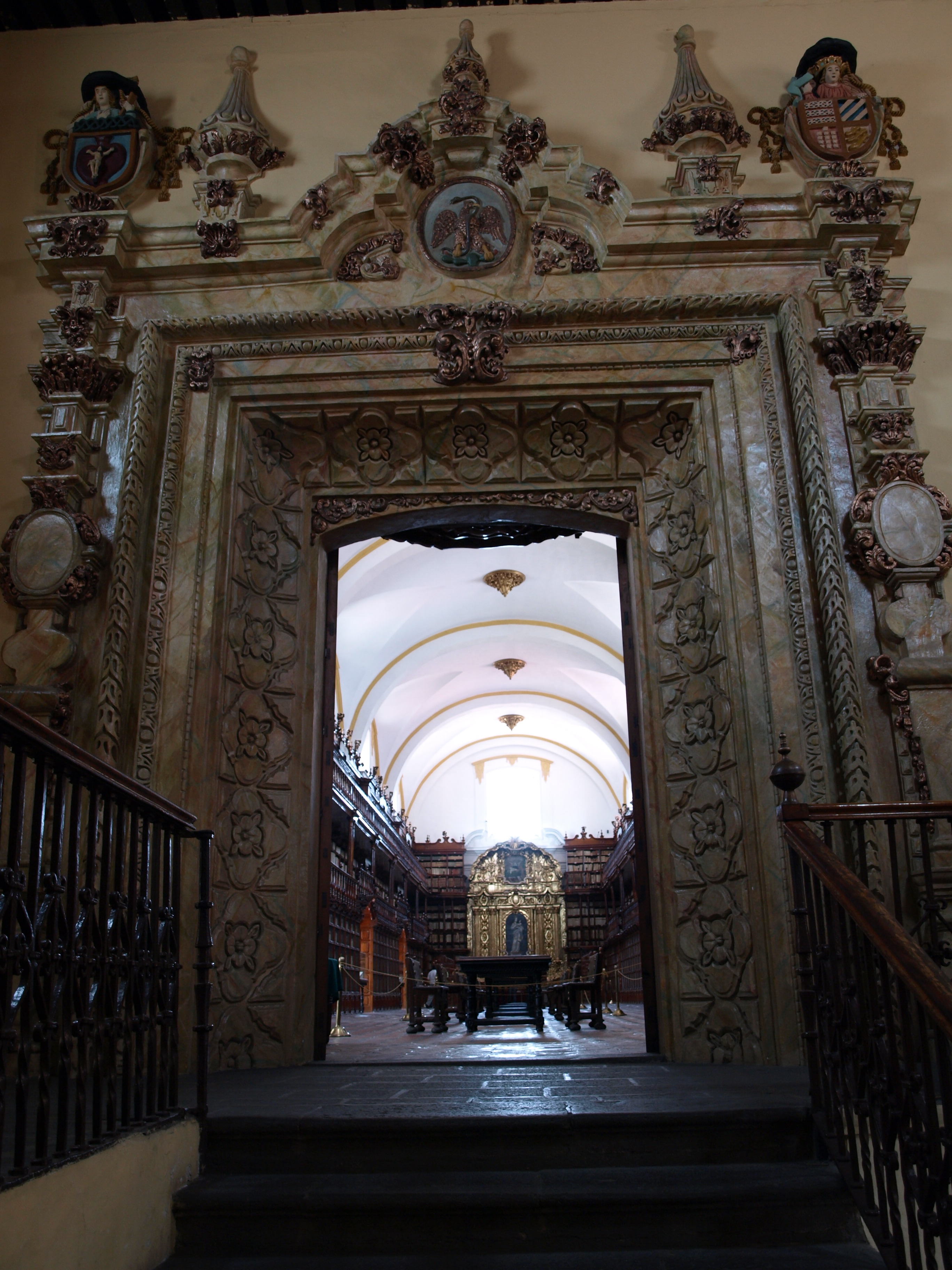 Biblioteca Palafoxiana